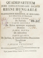 Dielo Pavla Príleského